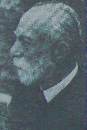 Aristide Caradja, Romanian entomologist, jurist and academician